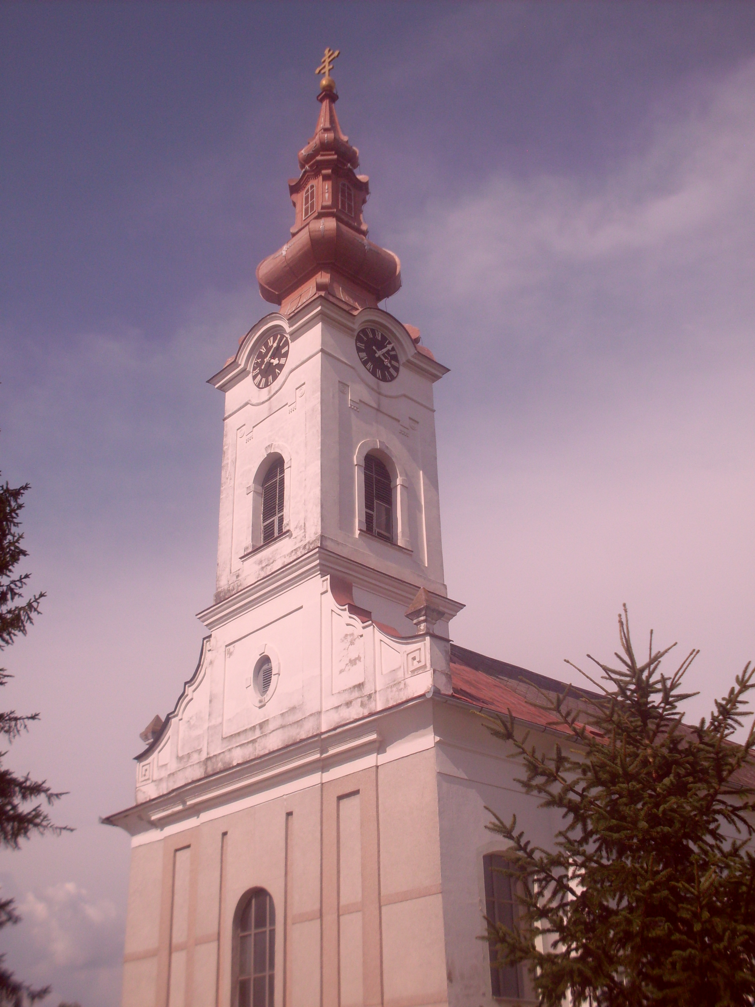 Srpski (latinica): Grkokatolička crkva u Kucuri